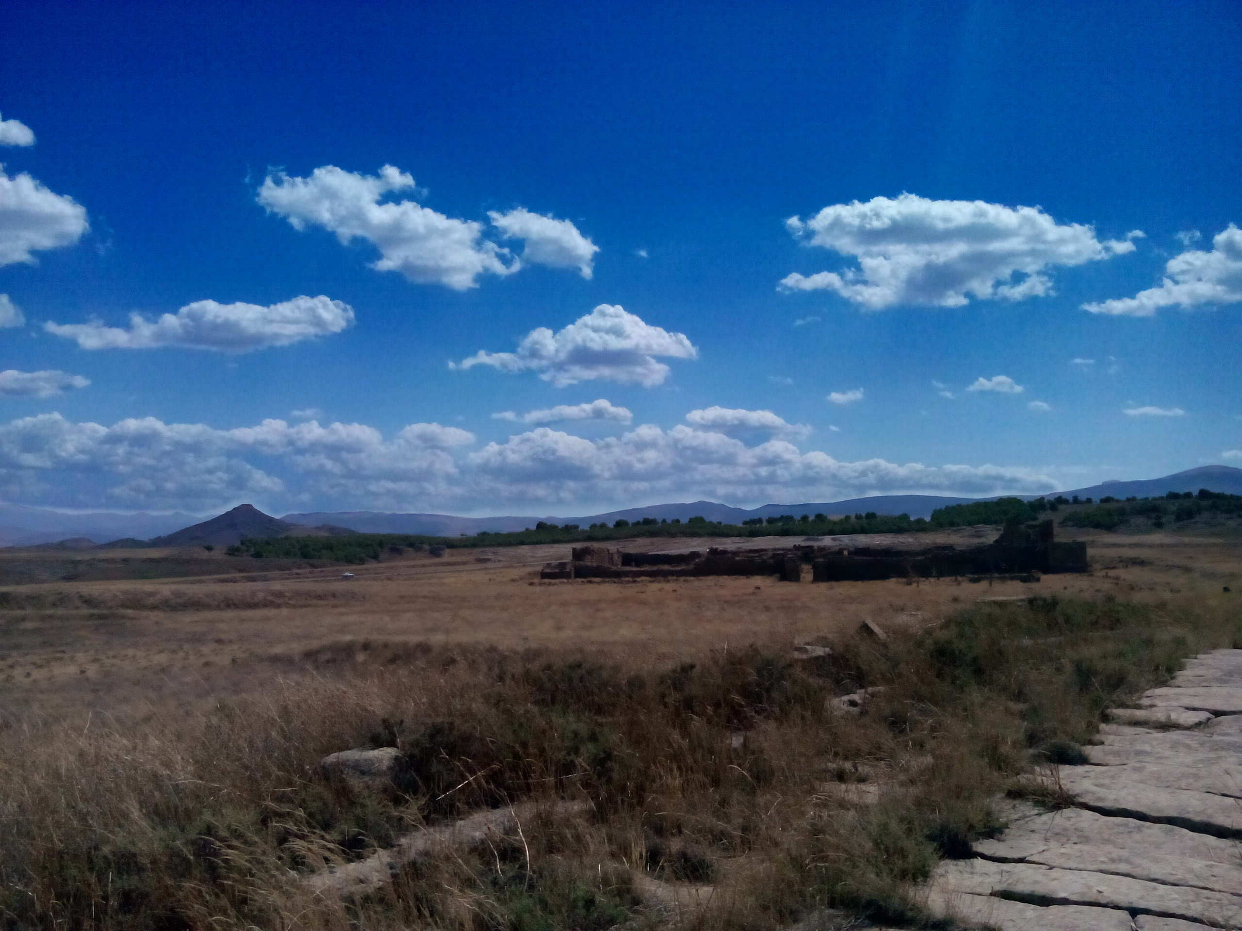 Territoires et monuments de l'antique Thamugadi.